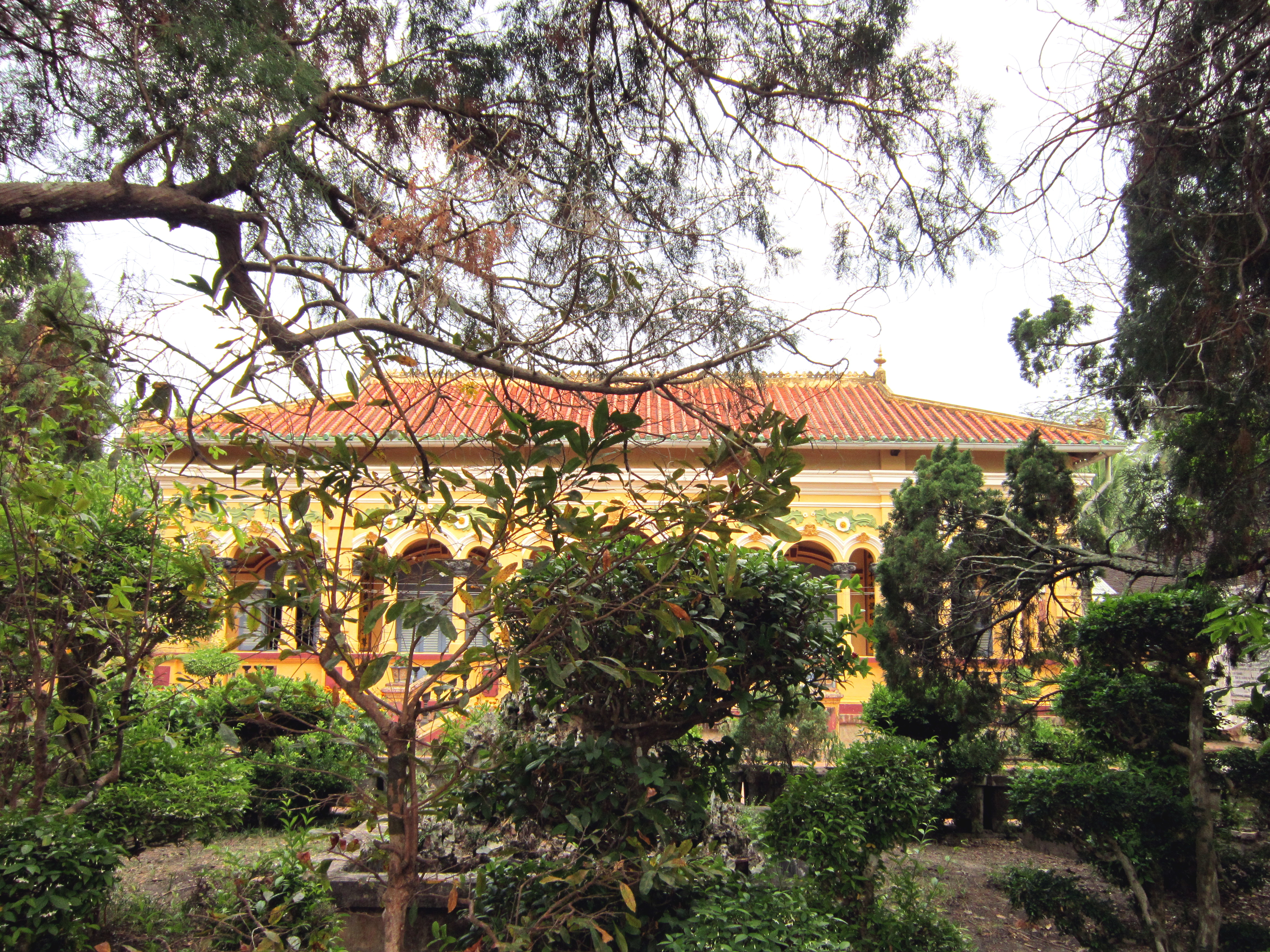 Chùa Nam Nhã tọa lạc ở số 612, đường Cách Mạng Tháng Tám, phường An Thới, quận Bình Thủy, thành phố Cần Thơ, Việt Nam.